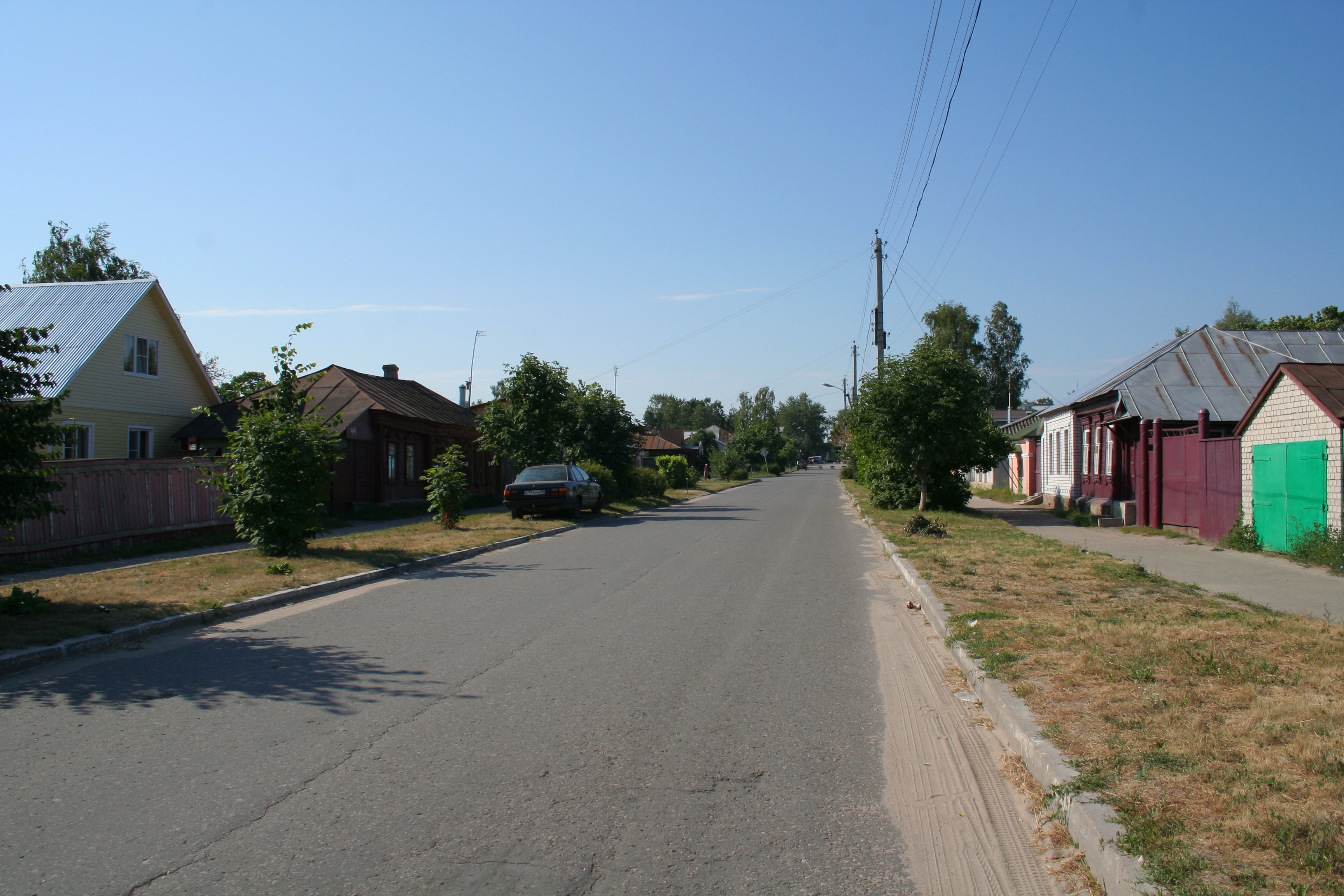 Stadt Spassk (Oblast Rjasan, Russland). Im Stadtzentrum.